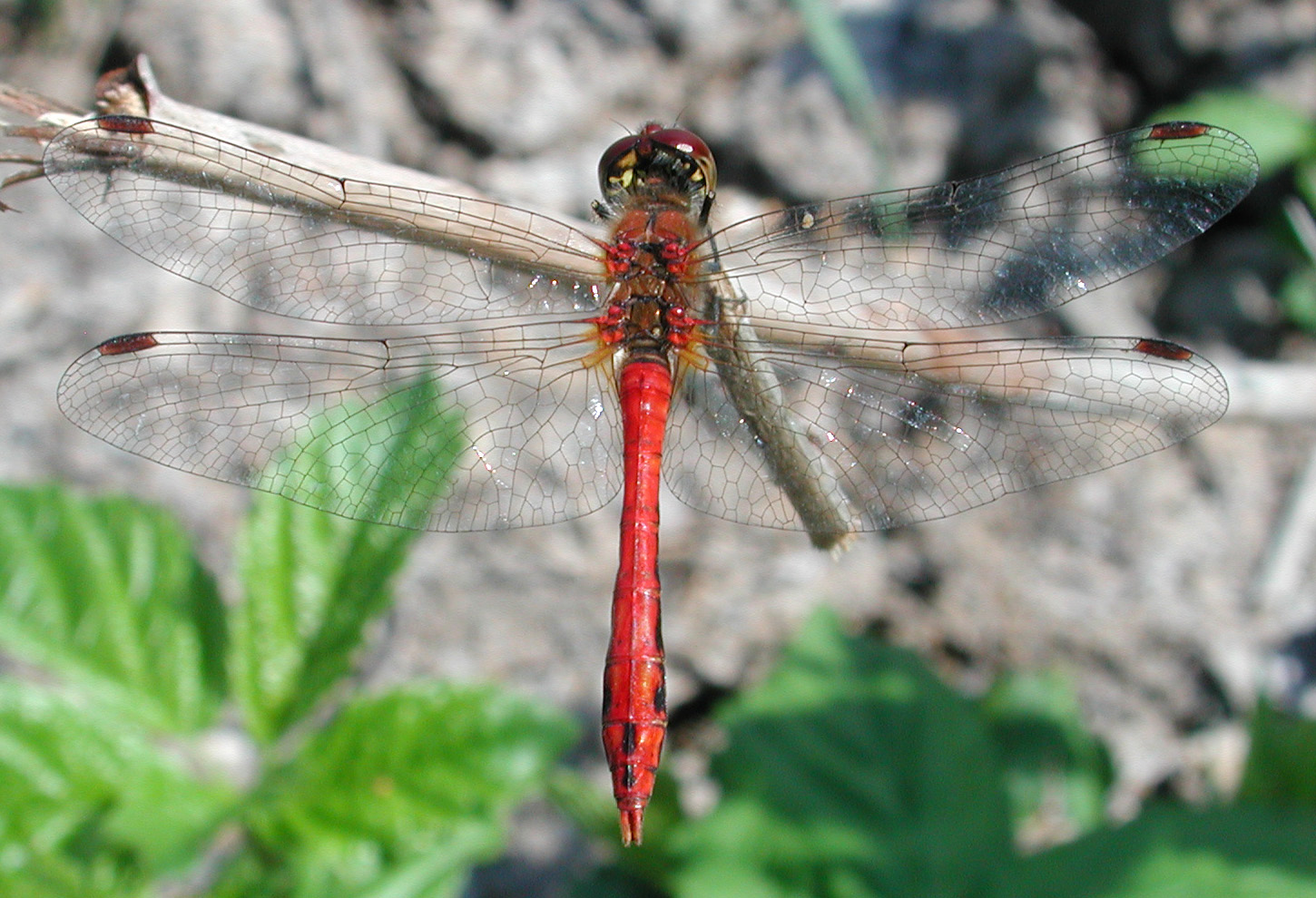 Sympetrum sanguineum, m., NSG Kirchwerder Wiesen, Elbmarsch bei Hamburg, Deutschland